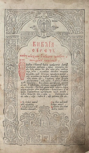 Патриарх Никон